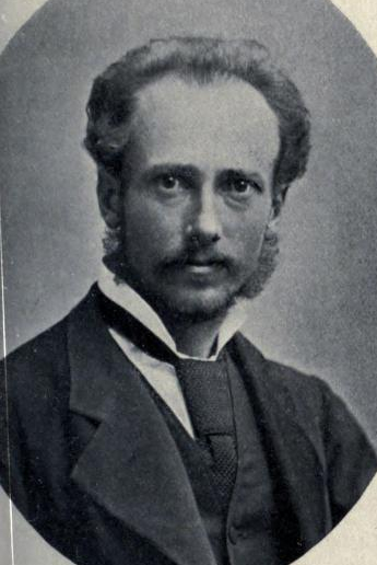 Otto Widmann